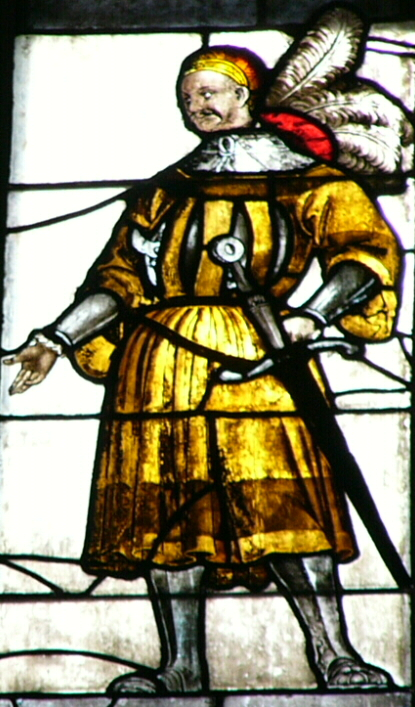 Ausschnitt aus dem Markgrafenfenster von St. Sebald in Nürnberg: Markgraf Johann Albrecht